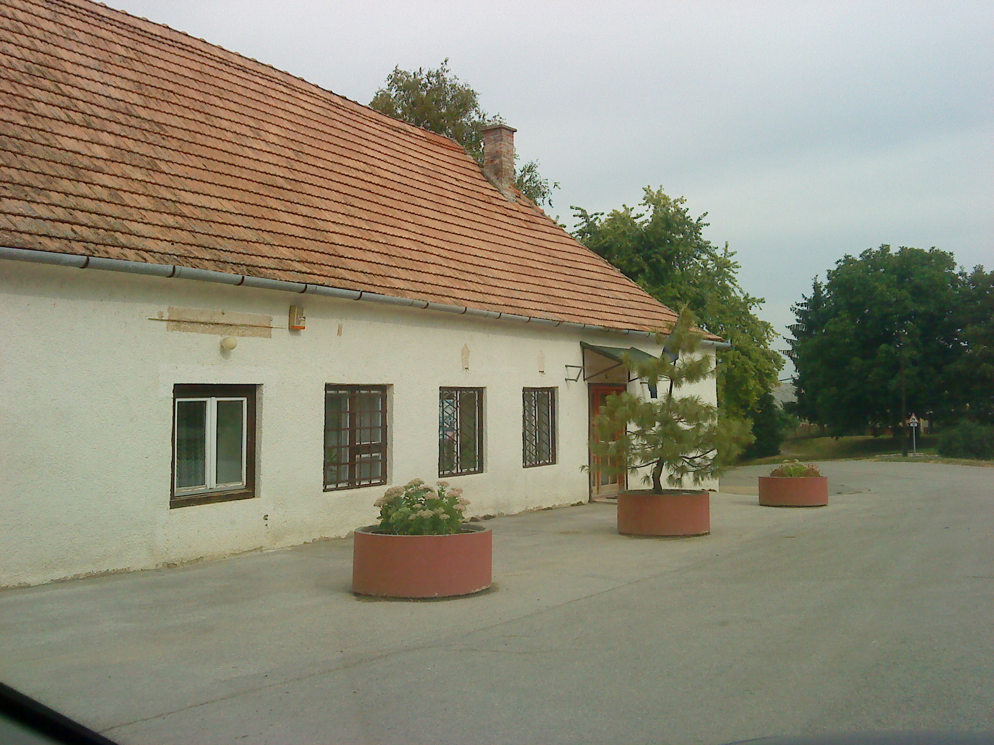 Túrony polgármesteri hivatal